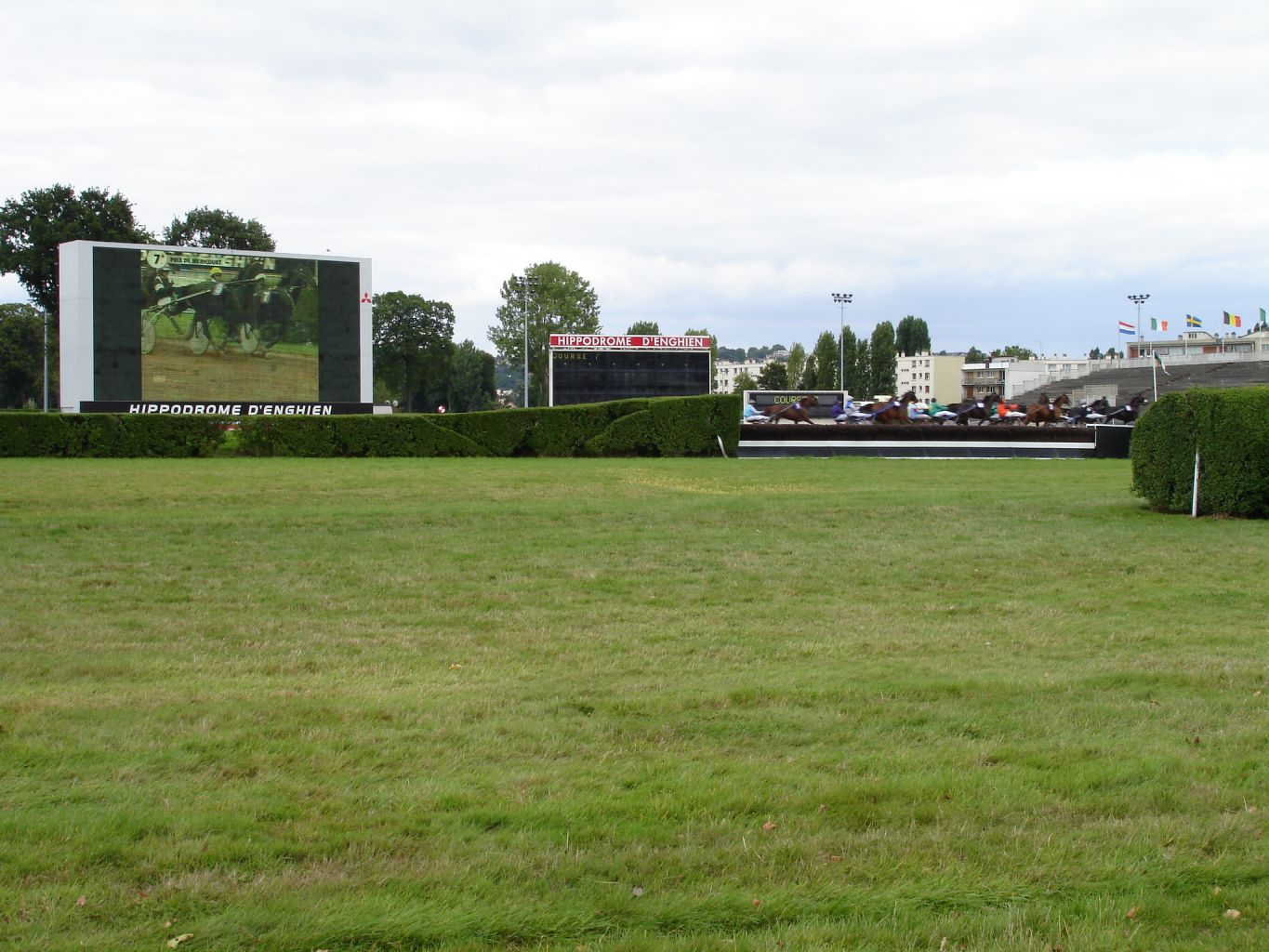 Hippodrome d'Enghien-Soisy, Val-d'Oise (France) - 15 Août 2005 Le champ de courses se situe sur les territoires des communes de Soisy-sous-Montmorency (90%) et Eaubonne (10%). Photo personnelle (own work) de Clicsouris